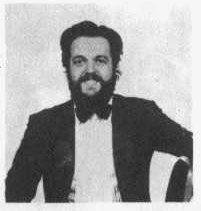 Daniel Rabinovich, músico y humorista argentino.